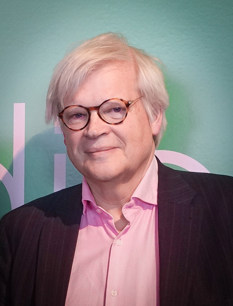 Thomas Nordegren i Nordegren & Epstein i P1 under en inspelning på Kulturhuset Stadsteatern i Stockholm den 26 april 2018.